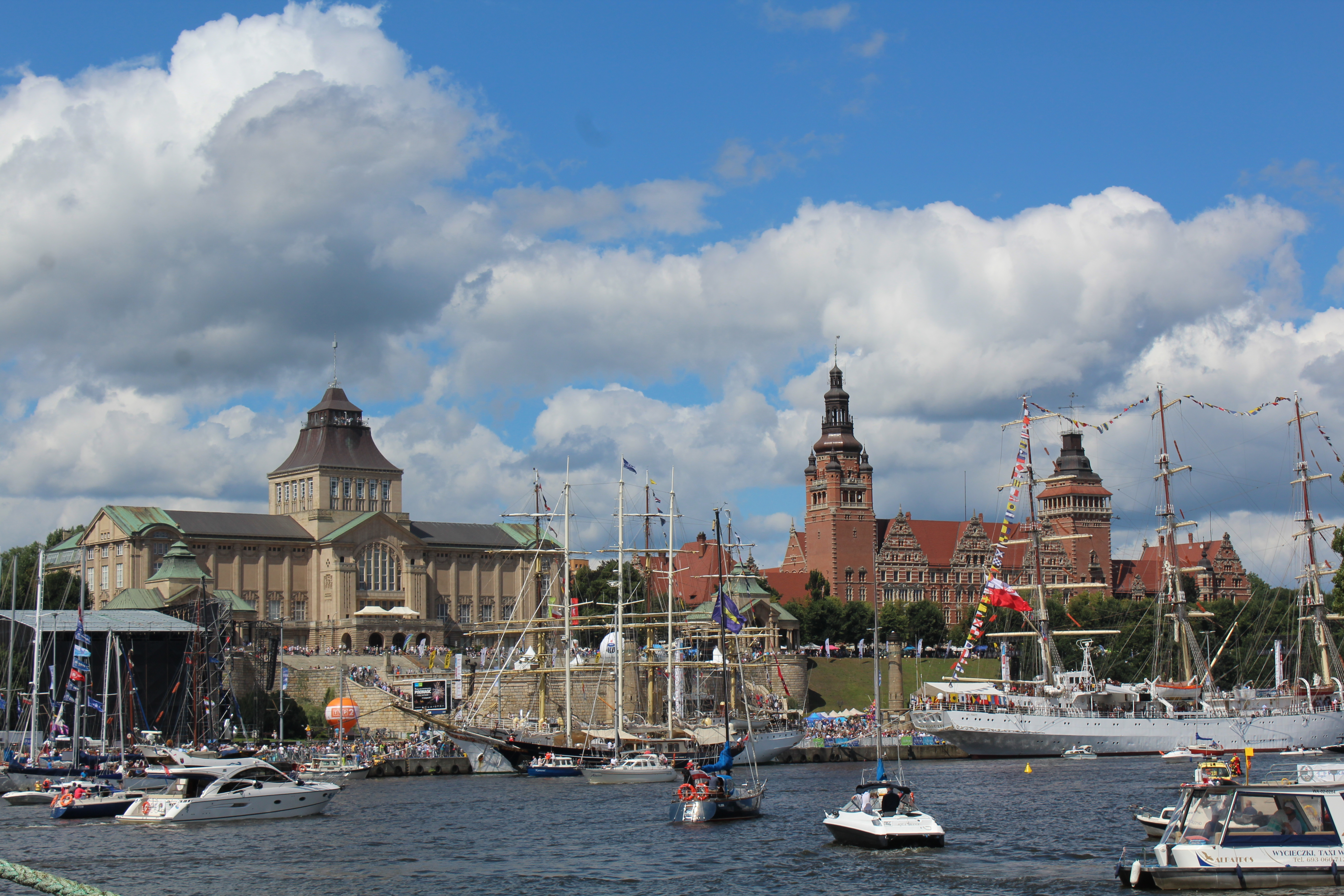 The Tall Ships’ Races 2017, Wały Chrobrego, Szczecin